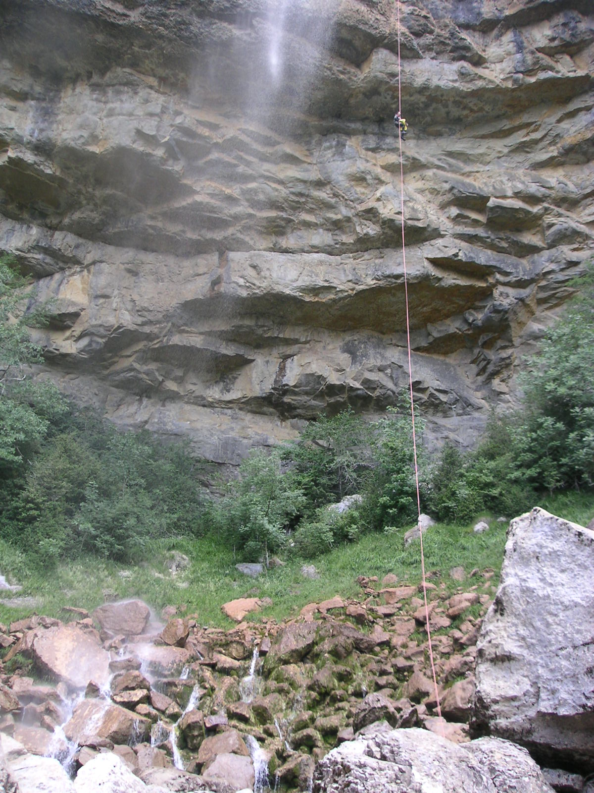 Cascade de la queue de cheval - rivière du Grosdar - Saint-Claude (Jura) Photo Jura, France, Août 2004 Jean Pavageau